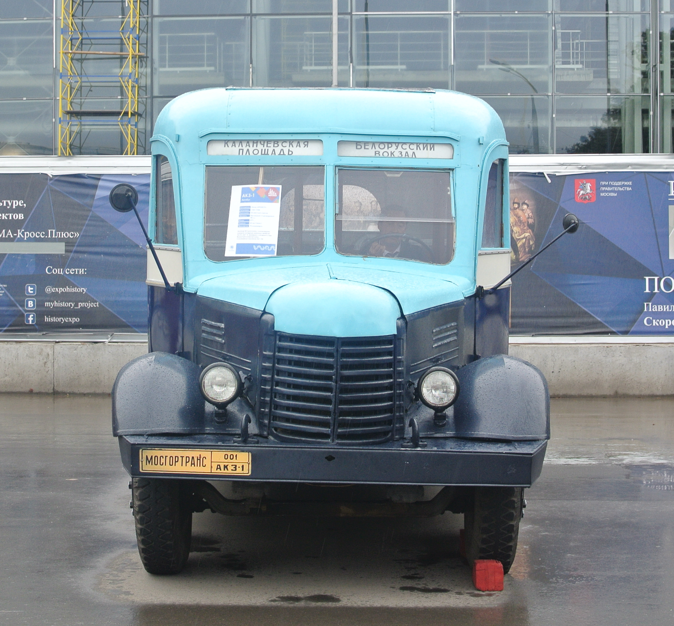 Автобус АКЗ-1 на выставке Мосгортранс на ВВЦ